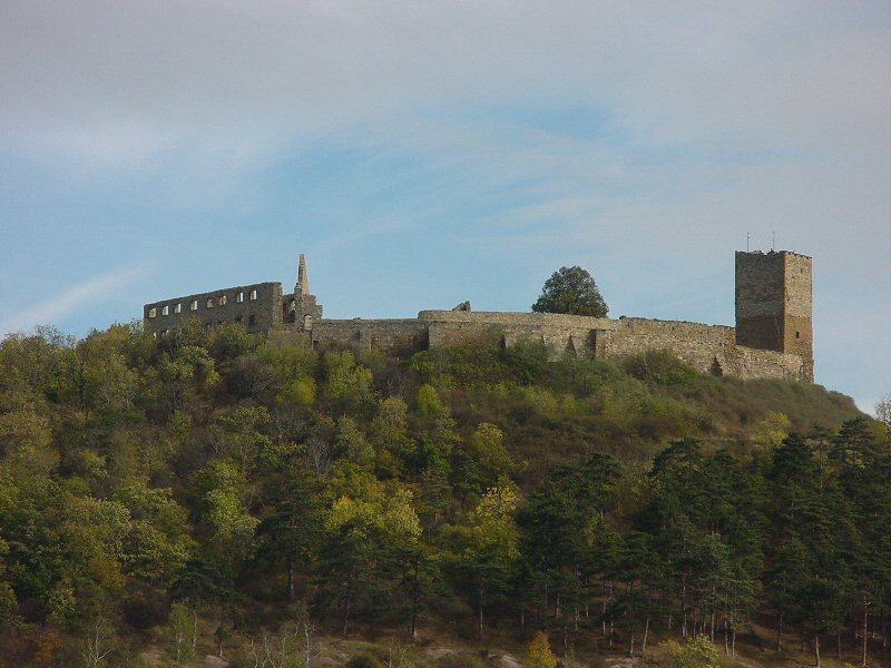 (Original text: Burg Gleichen)